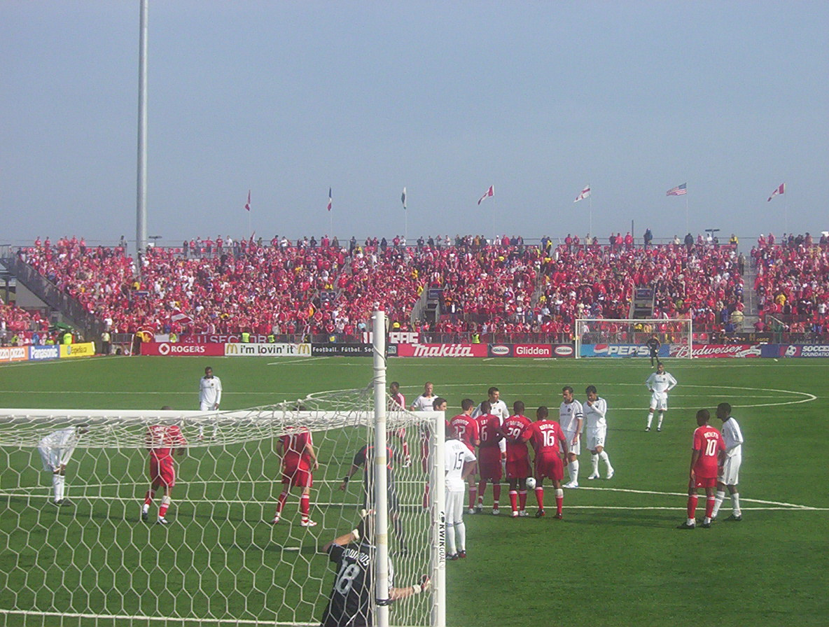 אצטדיון הכדורגל בטורונטו